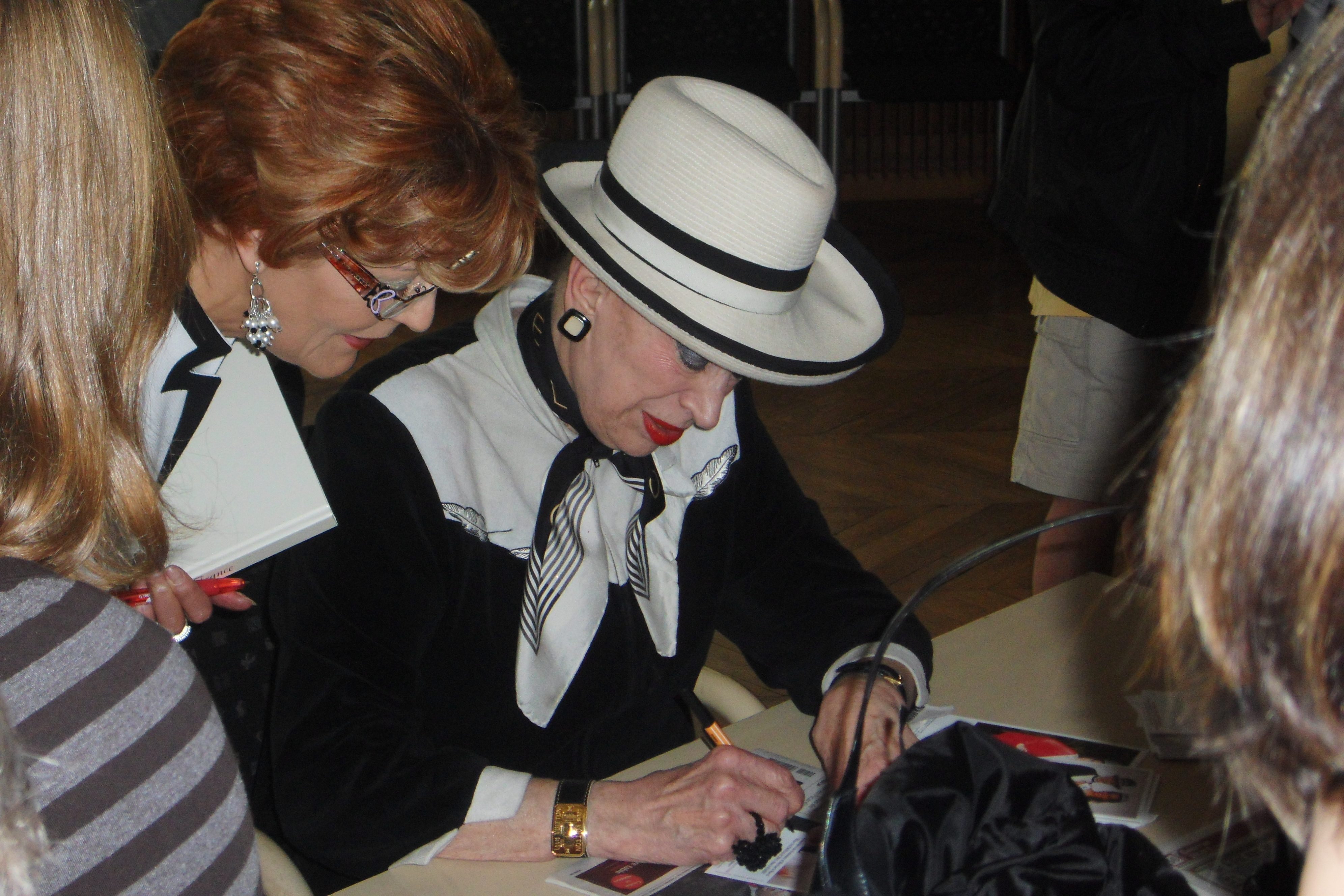 Séance de dédicace de Geneviève De Fontenay à Amiens en 2011